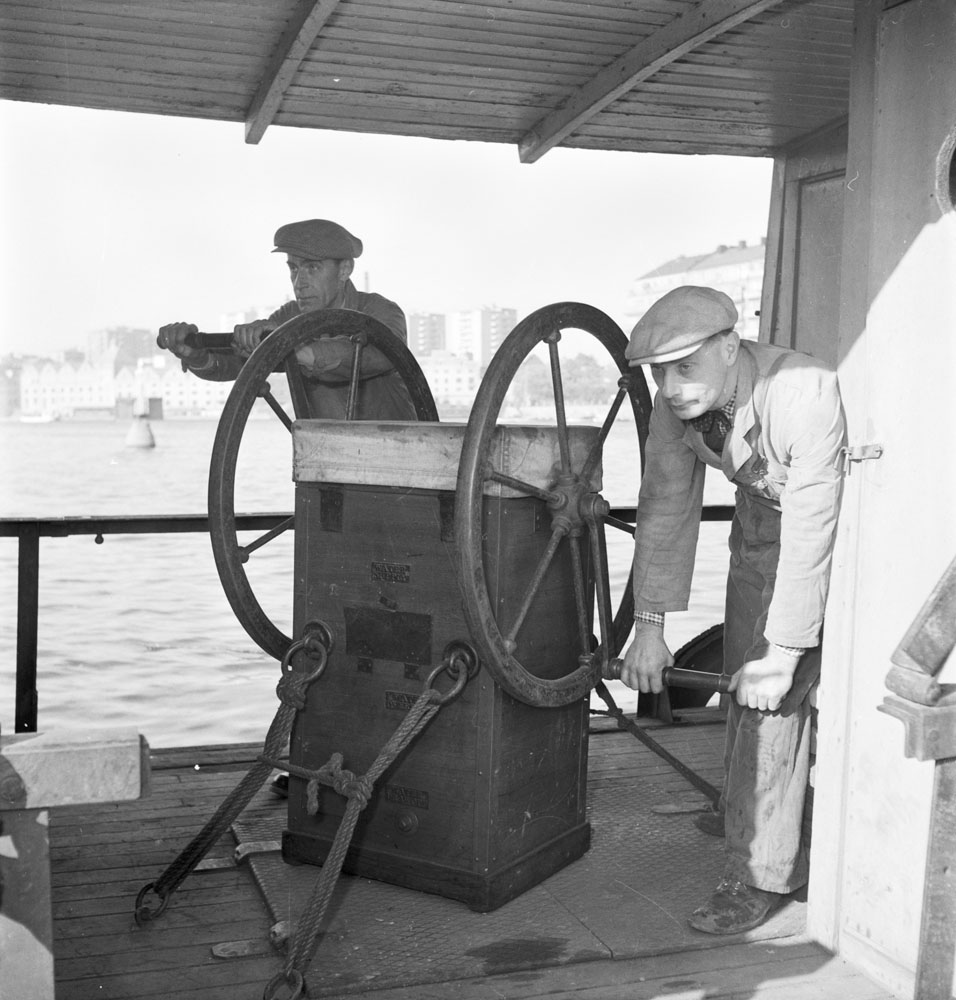 Luftpump för dykare i Stockholm 1951. Dykarreportage i Stockholm Photograph by: Goliath, Sven Date: 1951 Photo Nr: 2219-B3262 To the museum database (text in swedish)